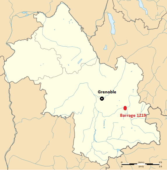 Carte de l'Isère avec localisation de l'éboulement ayant entraîné la catastrophe de 1219 à Grenoble. Note: le Drac au XIIIe siècle n'était pas encore canalisé et divaguait à travers la plaine de Grenoble.